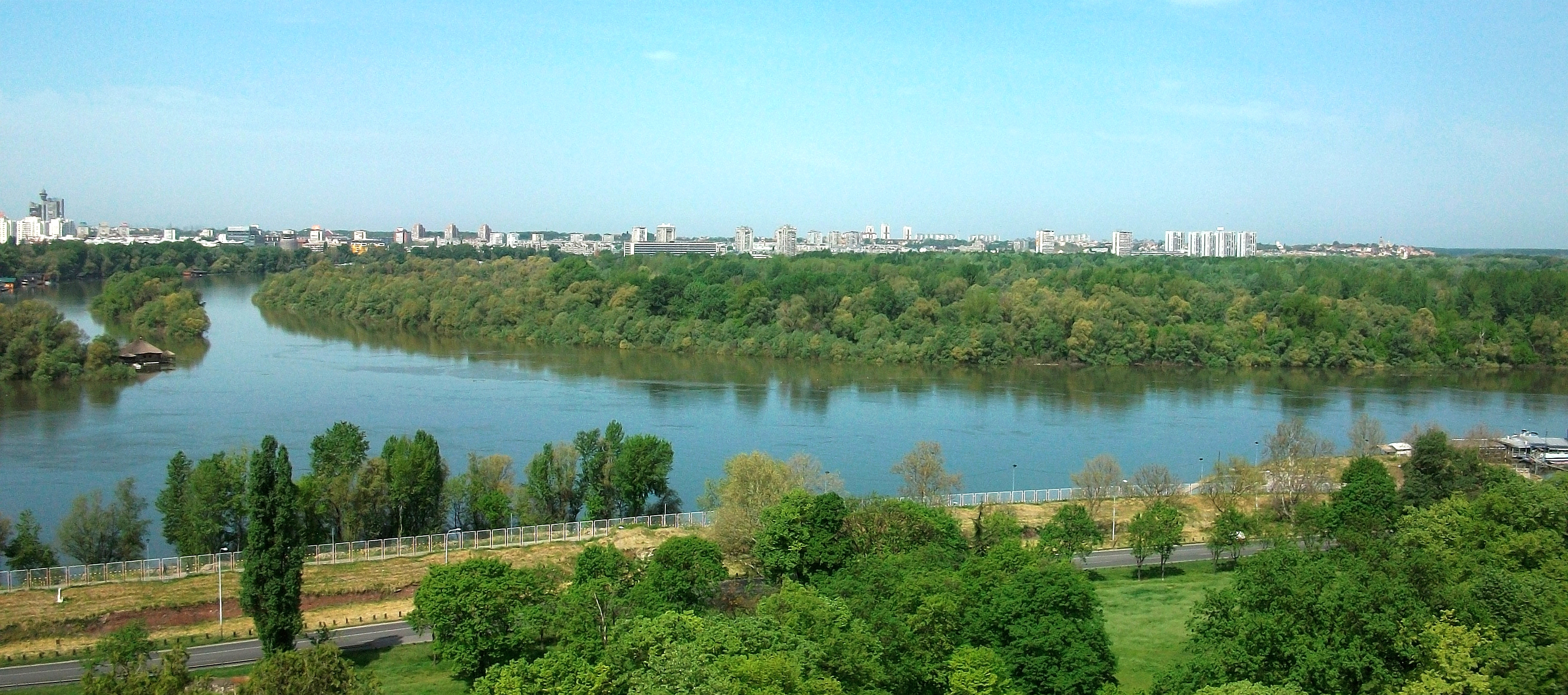 Panoramabild Belgrad (Serbien)